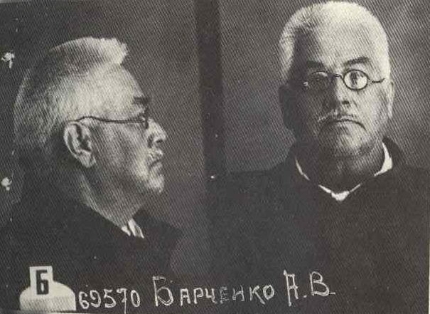 Фото сделано в Лефортовской тюрьме